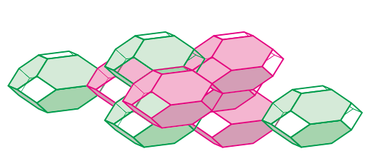 Ni4Mo